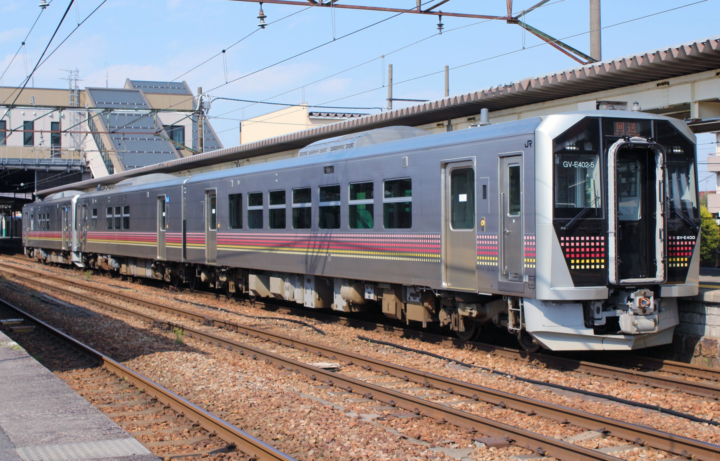 JR東日本GV-E400系気動車